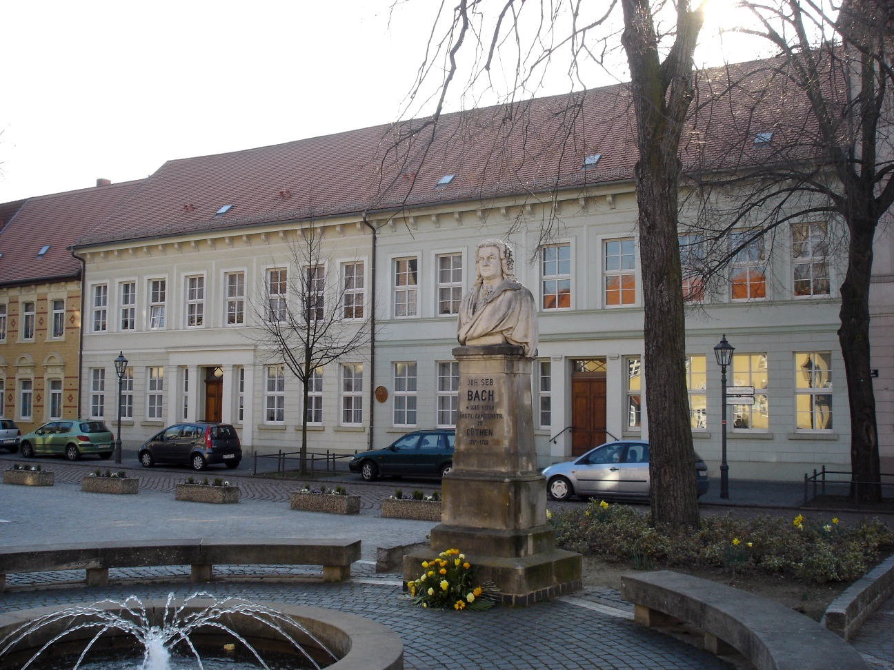 2. Köthener Bachhaus mit Bachdenkmal in Köthen, Deutschland